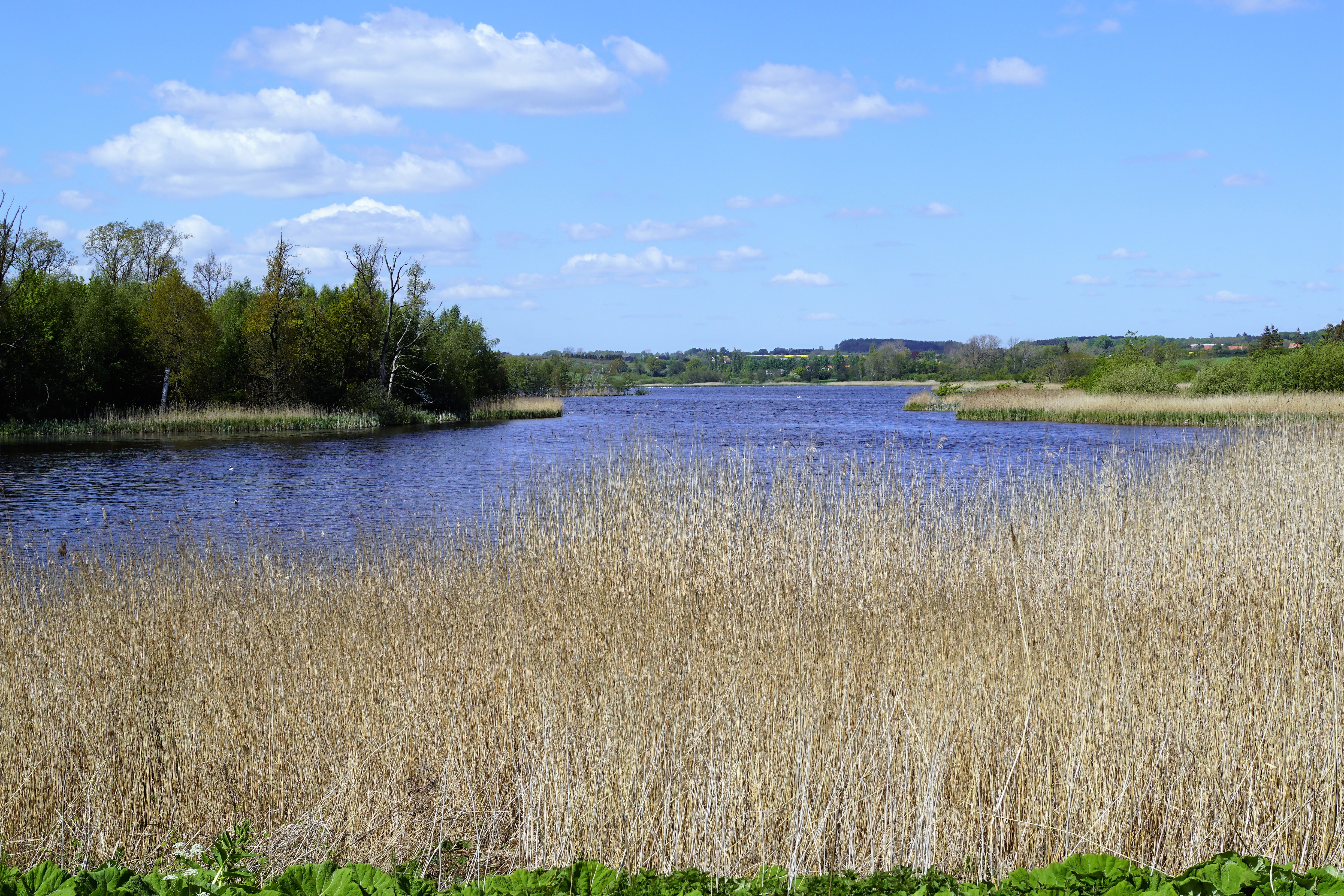 Inddæmningen ved Nakkebølle